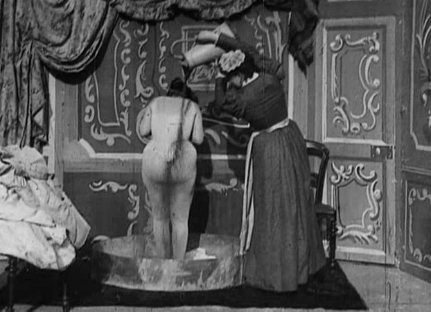 Méliès, Apres le bal (Star Film 128, 1897)